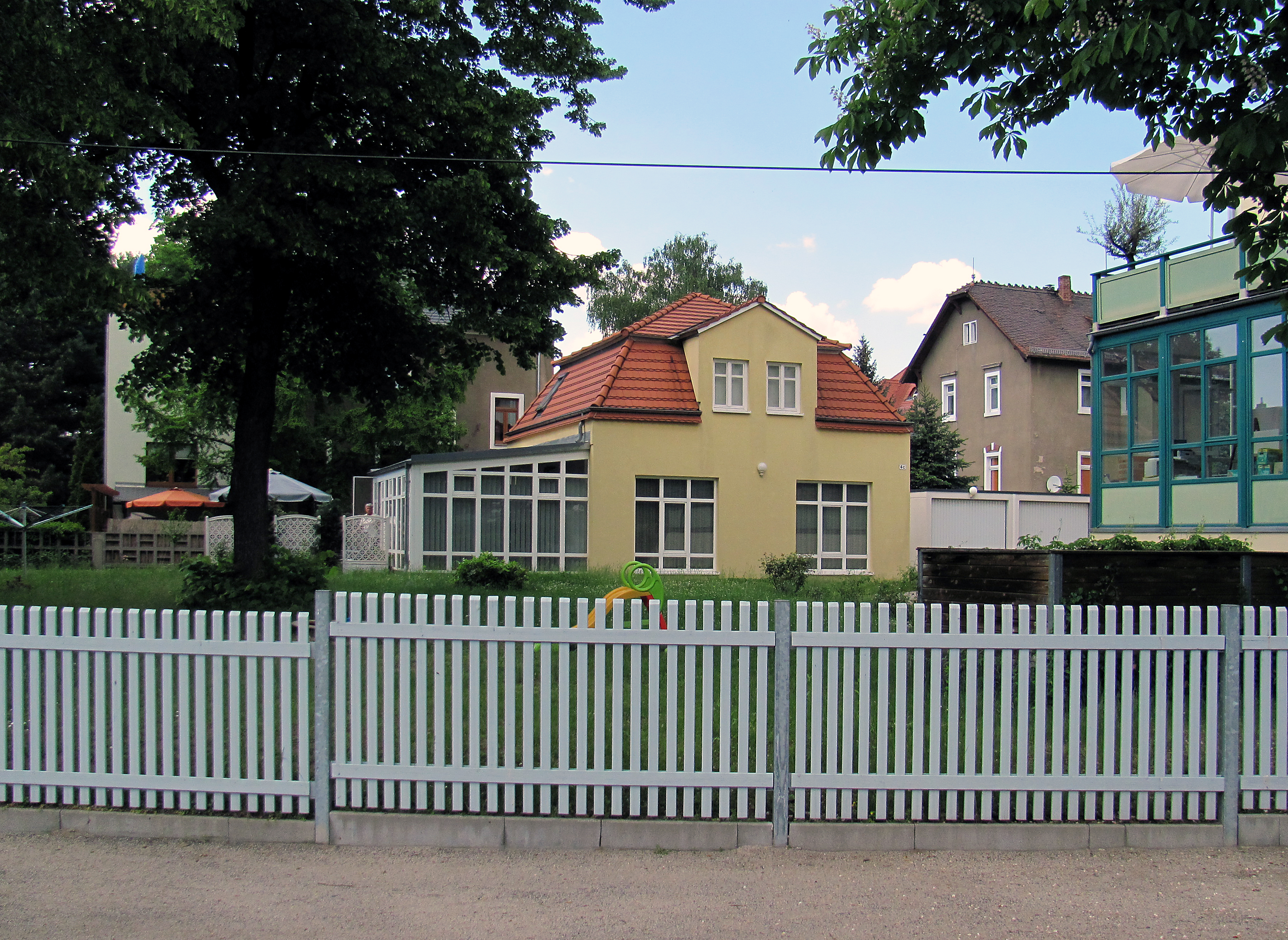 Radebeul-Niederlößnitz, Mietvilla Heinrich Gerhardt, ehemalige Remise